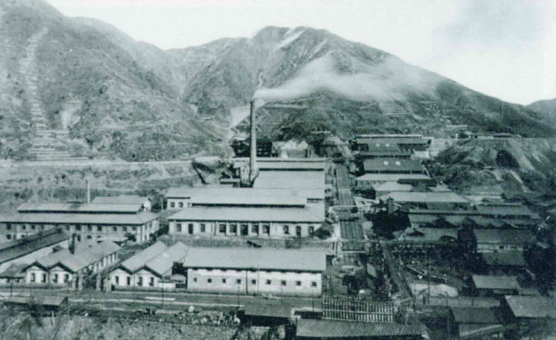 La mine d'argent d'Ikuno à l'époque moderne.